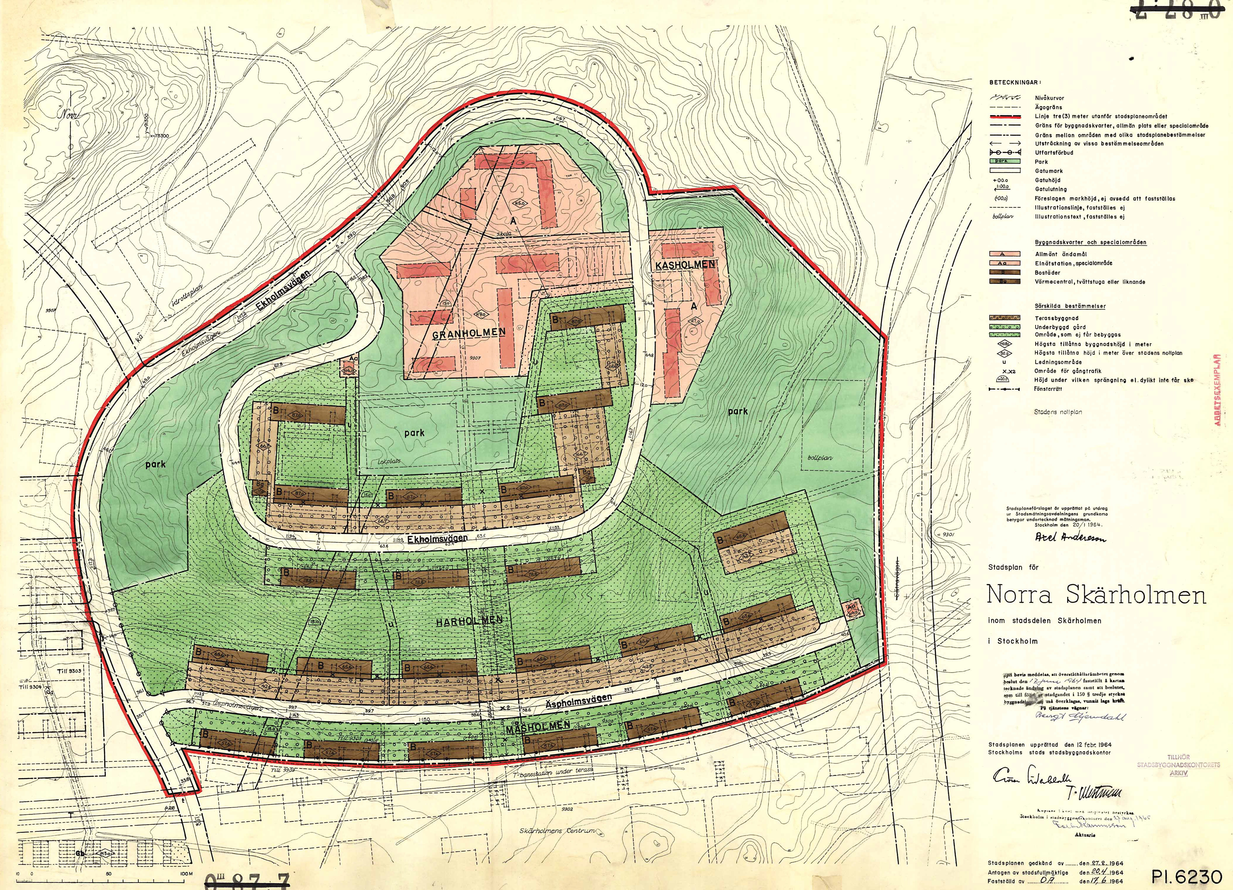 Stadsplan för norra delen av Skärholmen